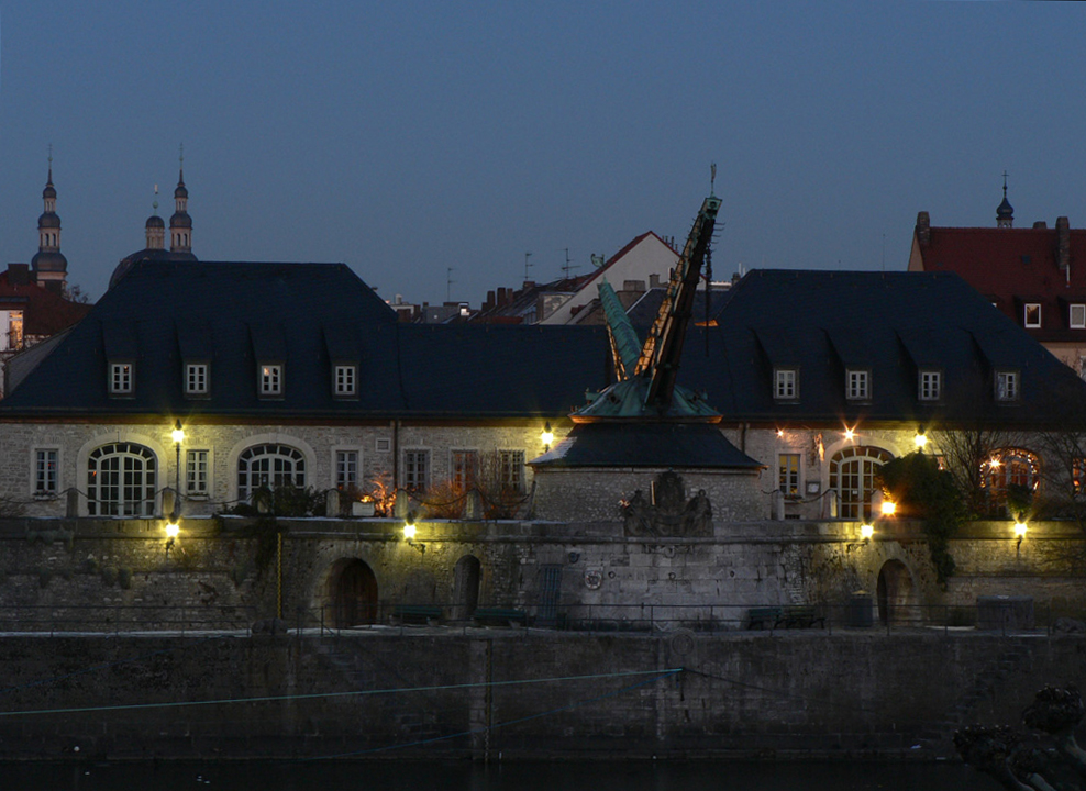 Alter Kranen bei Nacht Kamera: Panasonic DMX-FZ5 Lumix (Leica 36-432)